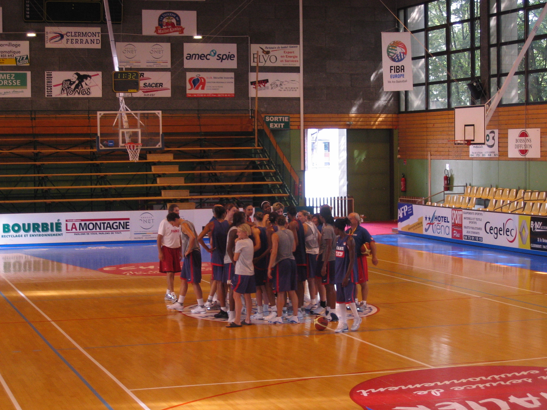 Photo de l'équipe de France féminine de basket-ball. Photo prise par sanguinez pendant le stage de préparation au Championnat du Monde Brésil'06 qui se déroulait à Clermont-Ferrand. Picture of the french national women basketball team, take in Clermont-Ferrand during the frnch preparation for the 2006 World Championship